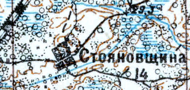 Топографическая карта Ленинградской области, квадрат VIc-28 (Луга), деревня Стояновщина